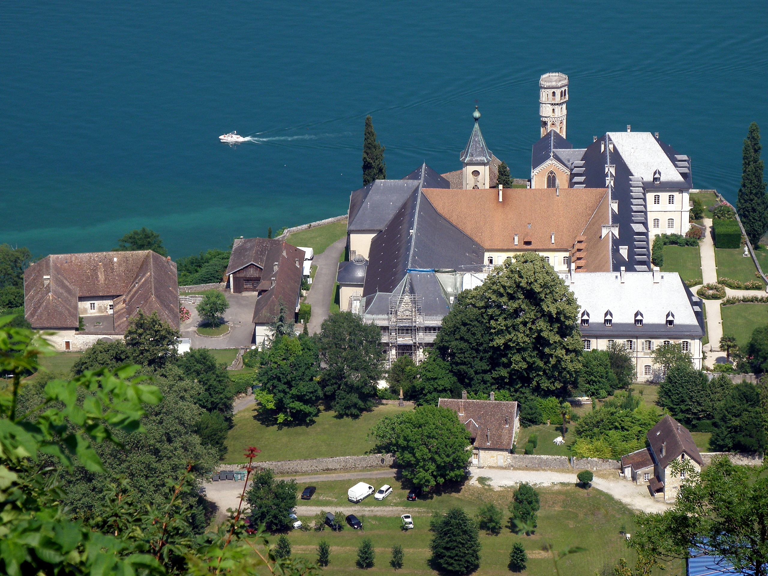 Saint-Pierre-de-Curtille, comm. du département de la Savoie (région Rhône-Alpes, France), sur la rive occidentale du lac du Bourget. Abbaye Notre-Dame-d’Hautecombe, telle qu’on l’aperçoit depuis la départementale 914. Nous regardons vers l’est.